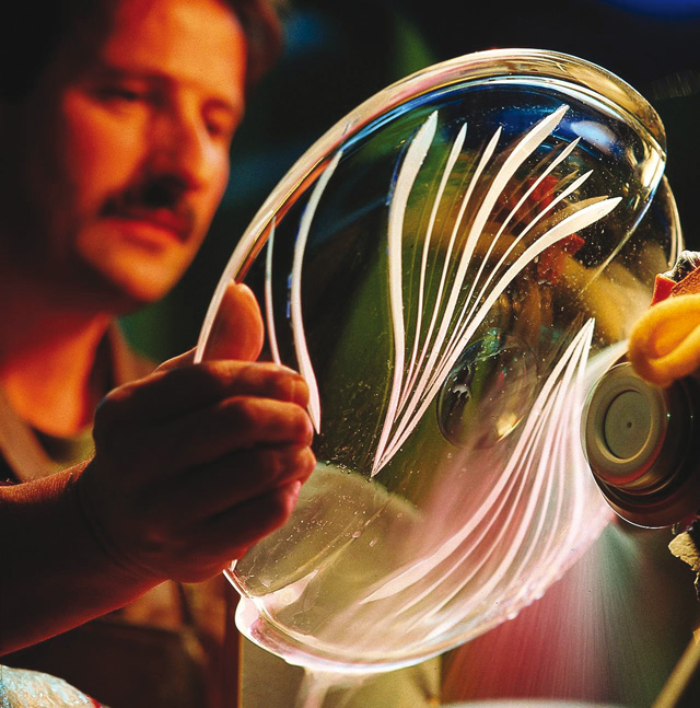 Joska Kristall Glasparadies, Glasschleifer